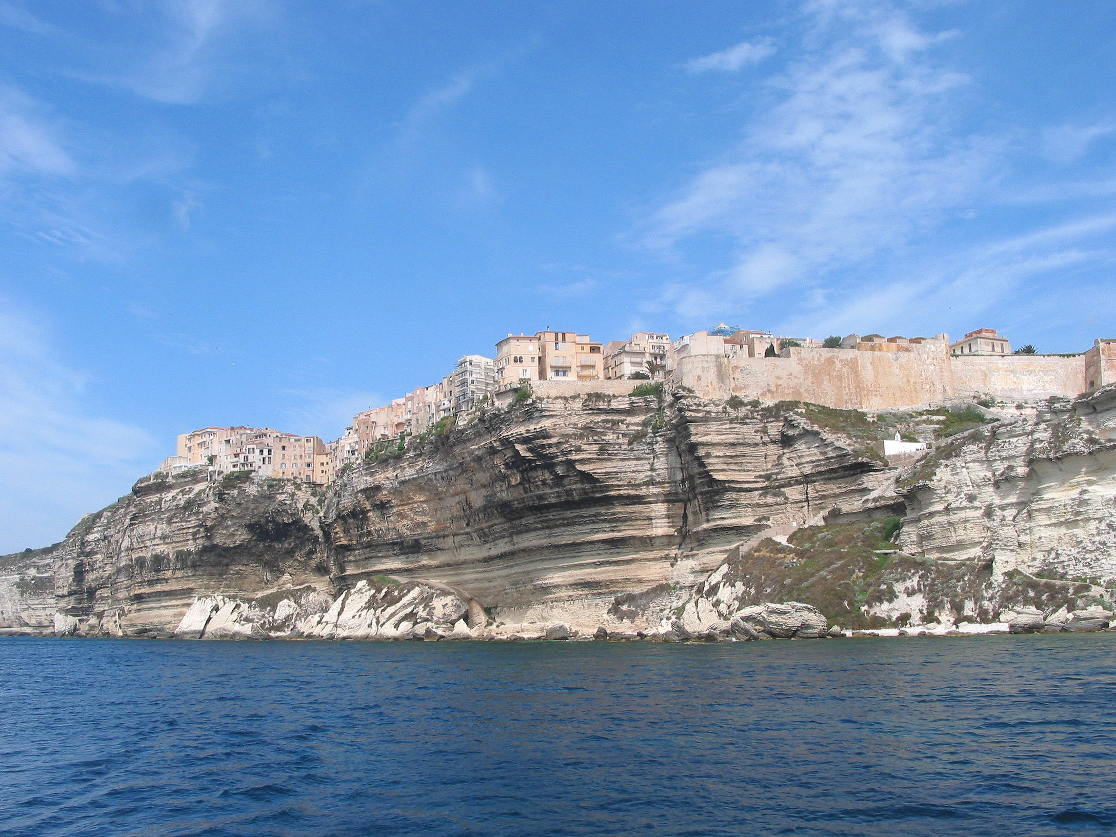 Bonifaccio France, la vieille ville perchée sur ses falaises de craie.